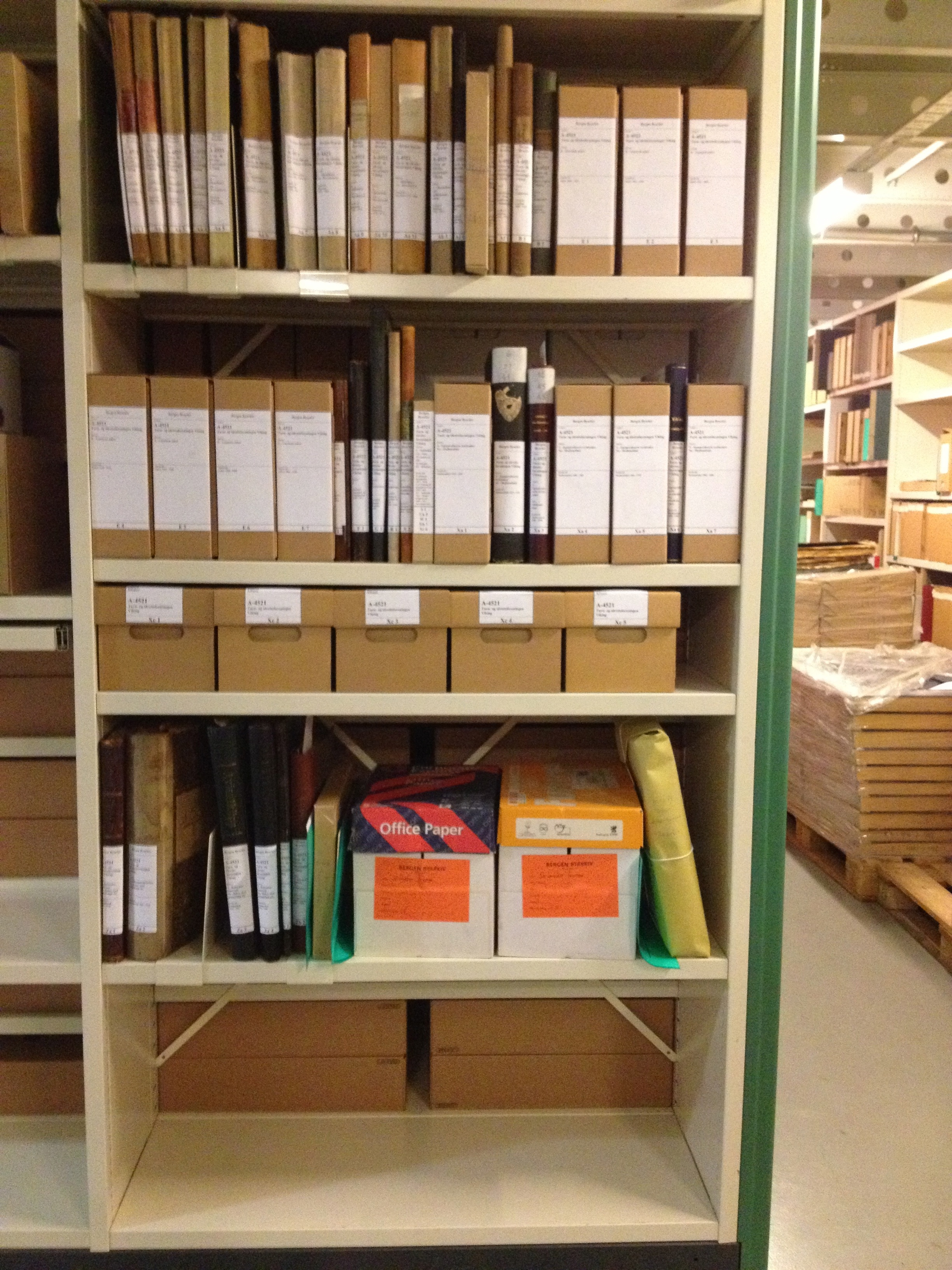 Det historiske arkivet til Turn og Idrettsforeningen Viking, oppbevart ved Bergen Byarkiv.